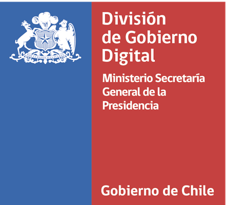 Logo de la División de Gobierno Digital. Ministerio Secretaría General de la Presidencia. Gobierno de Chile.